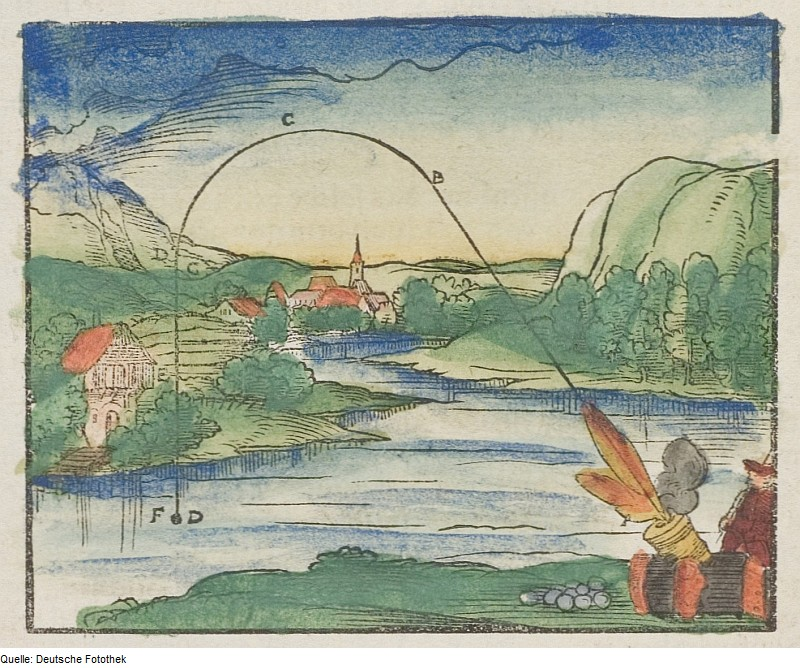 Original image description from the Deutsche Fotothek Ballistik & Kanone